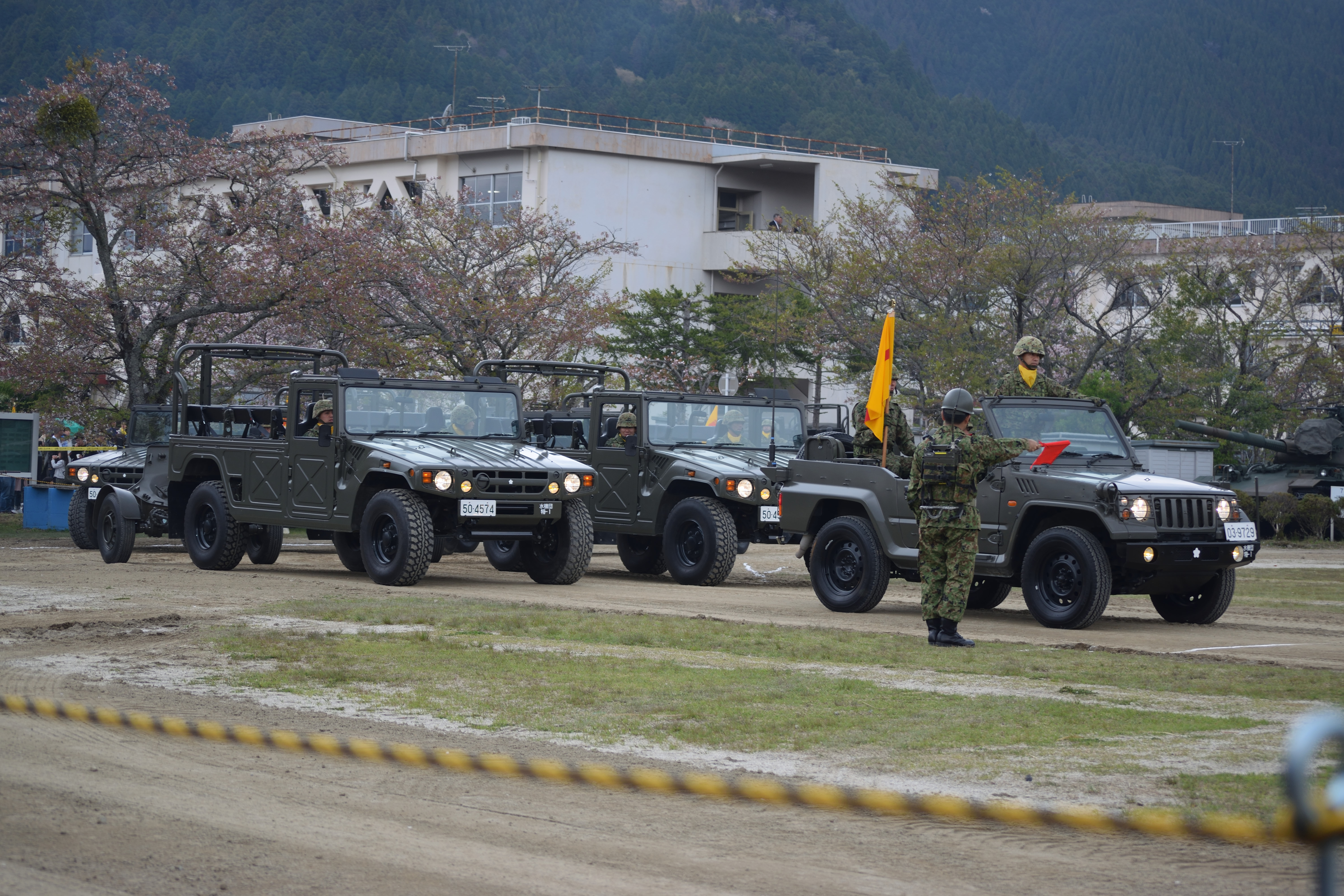 湯布院駐屯地記念式典にて。旧西部方面特科隊第112特科大隊 Nikon D3300